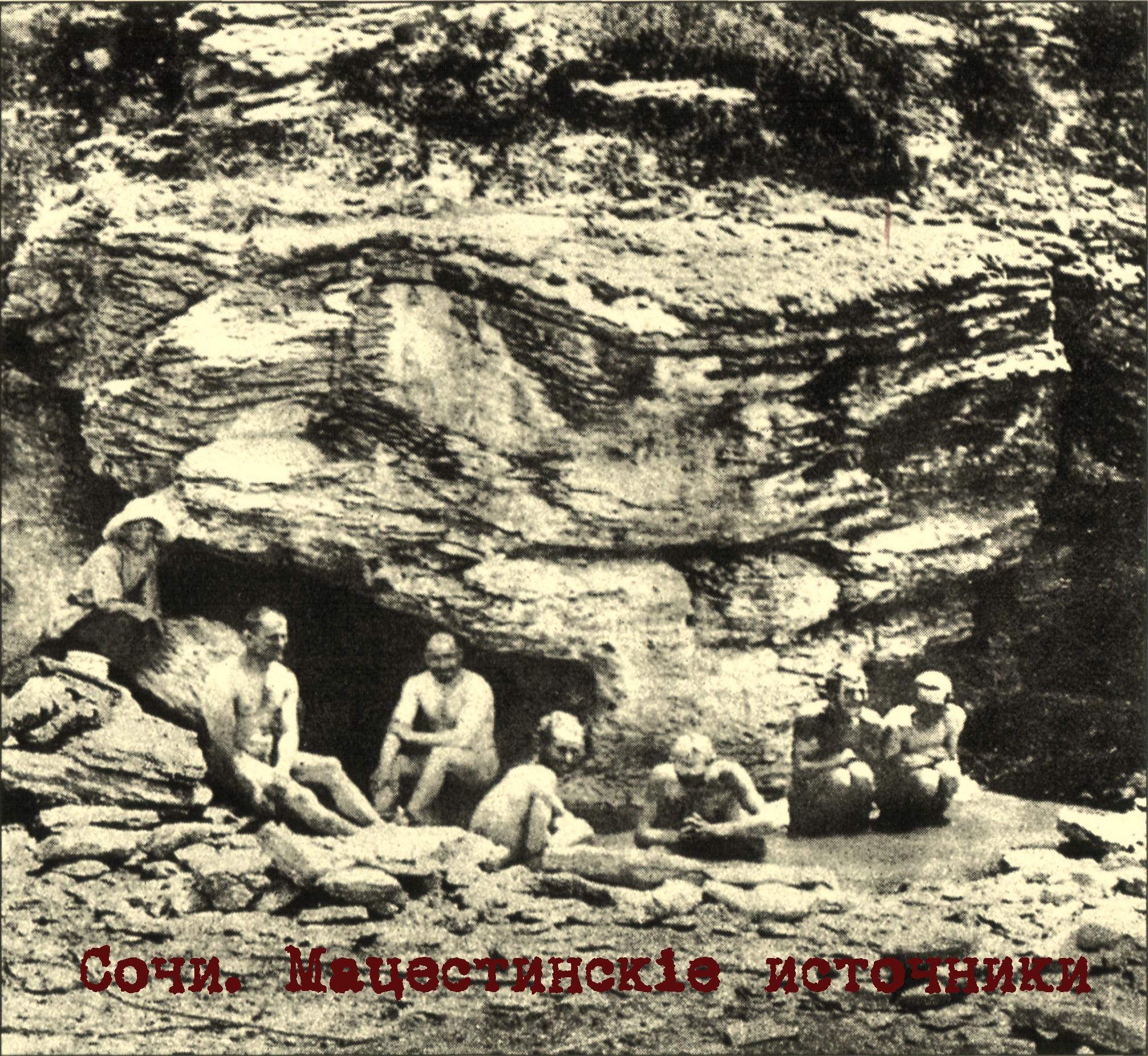 Прием мацестинских процедур примитивным способом